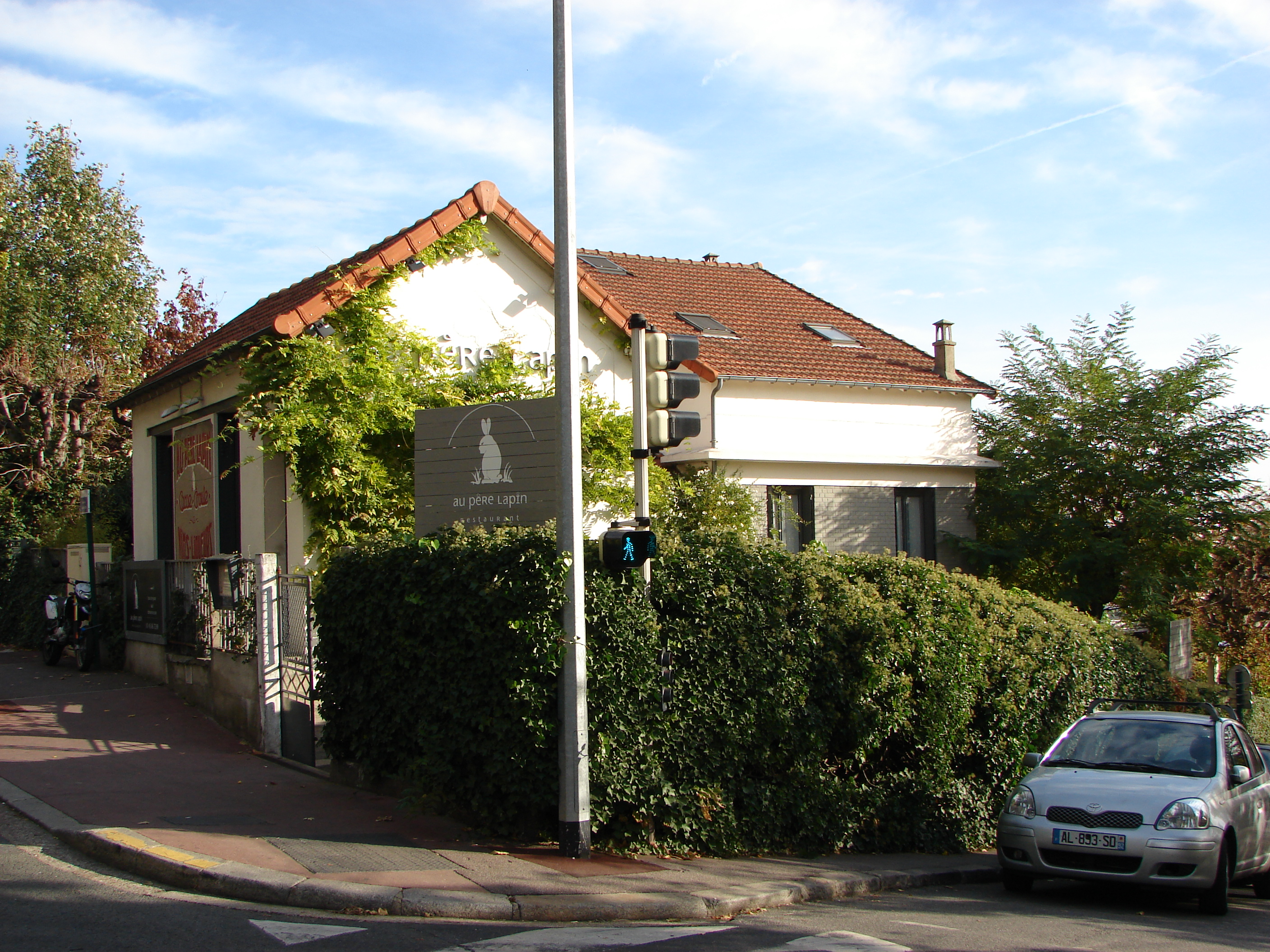 Vue de profil de l'Auberge Au Père Lapin située au 186 Boulevard Washington à Suresnes